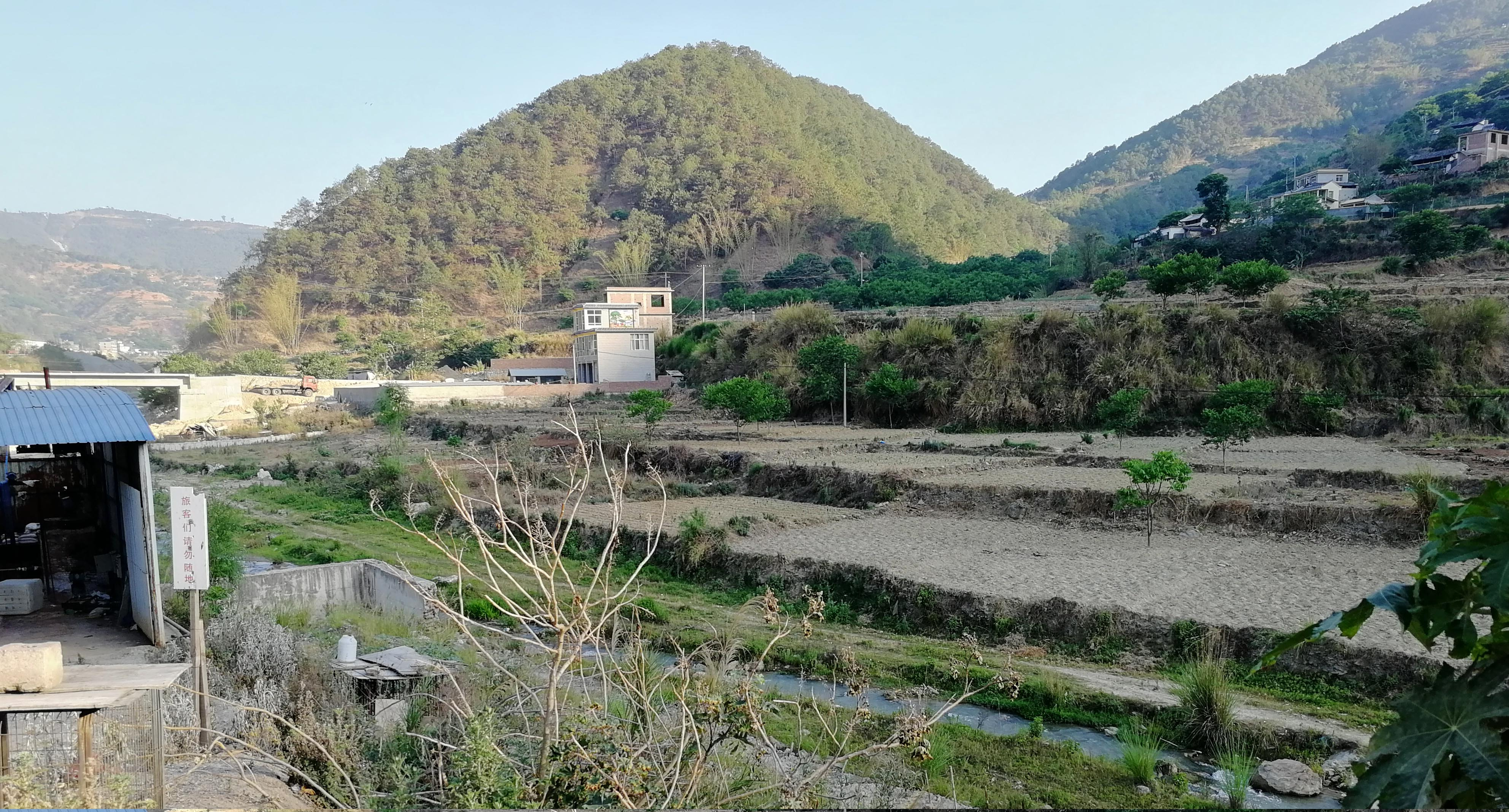 中国大理州南涧县境内的公郎河。